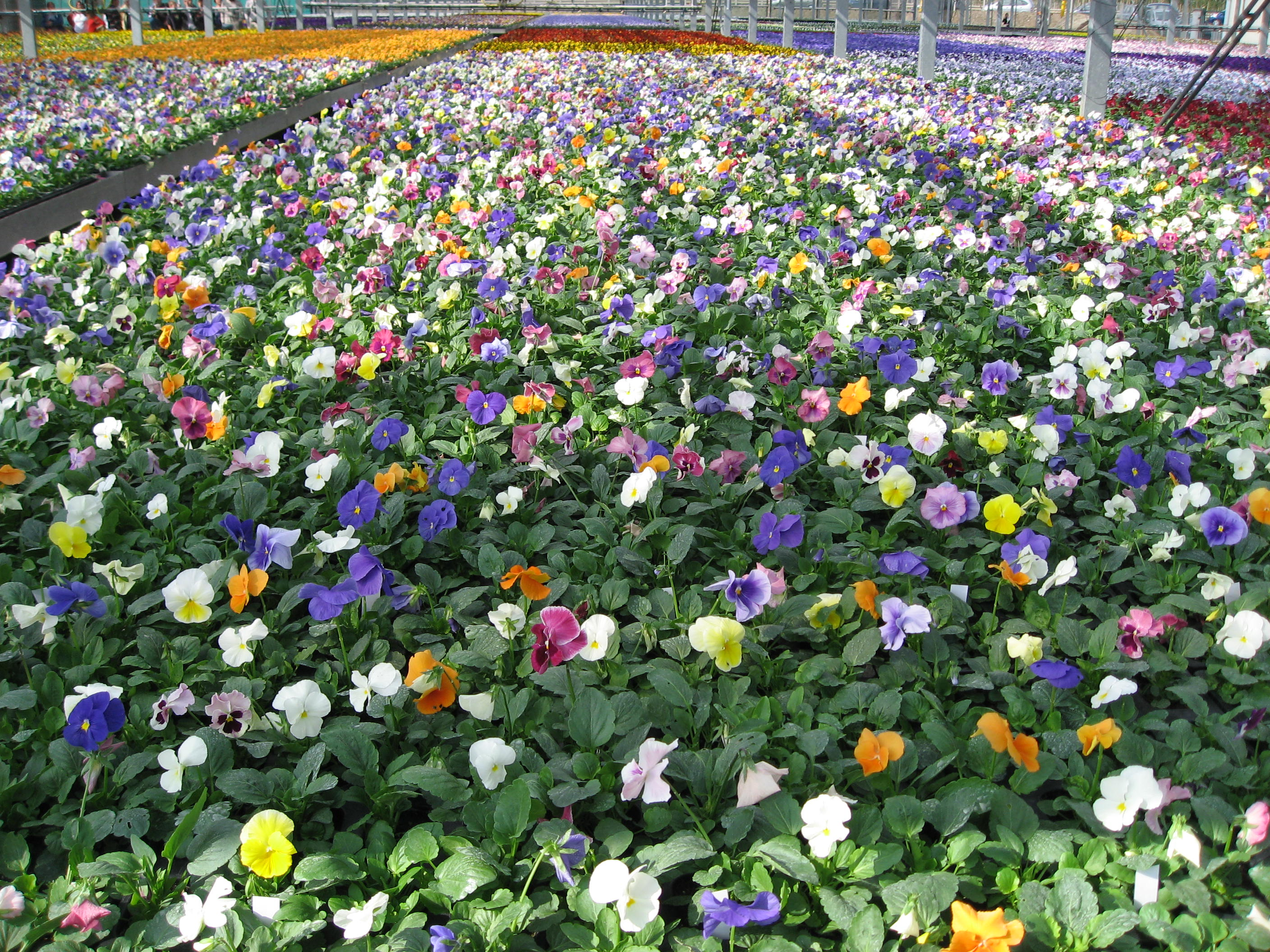 Viola sp. in Centre Horticole de la Ville de Paris